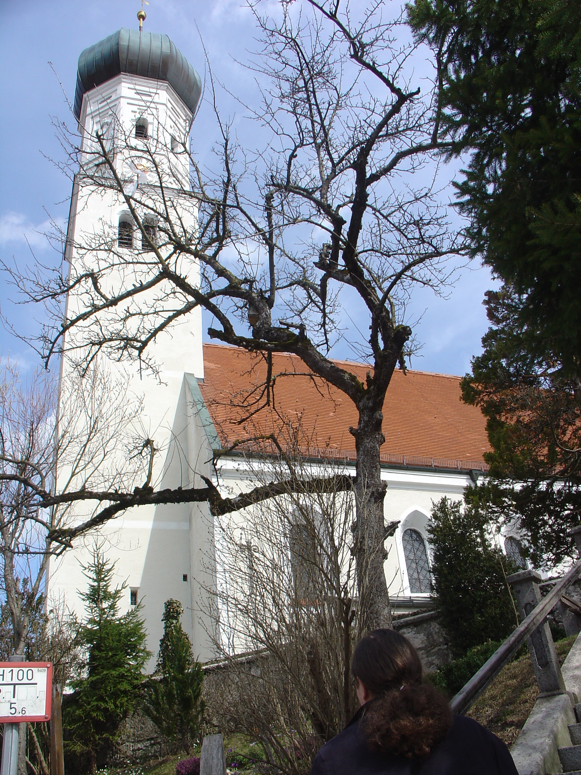 Die Pfarrkirche von Königsdorf